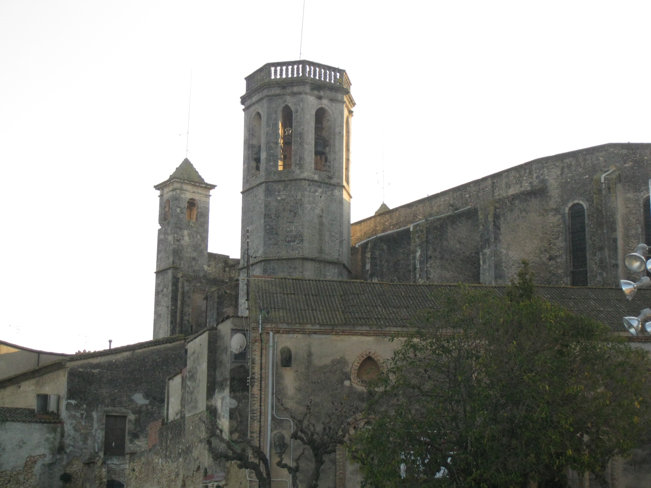 Església de Sant Julià (l'Arboç)